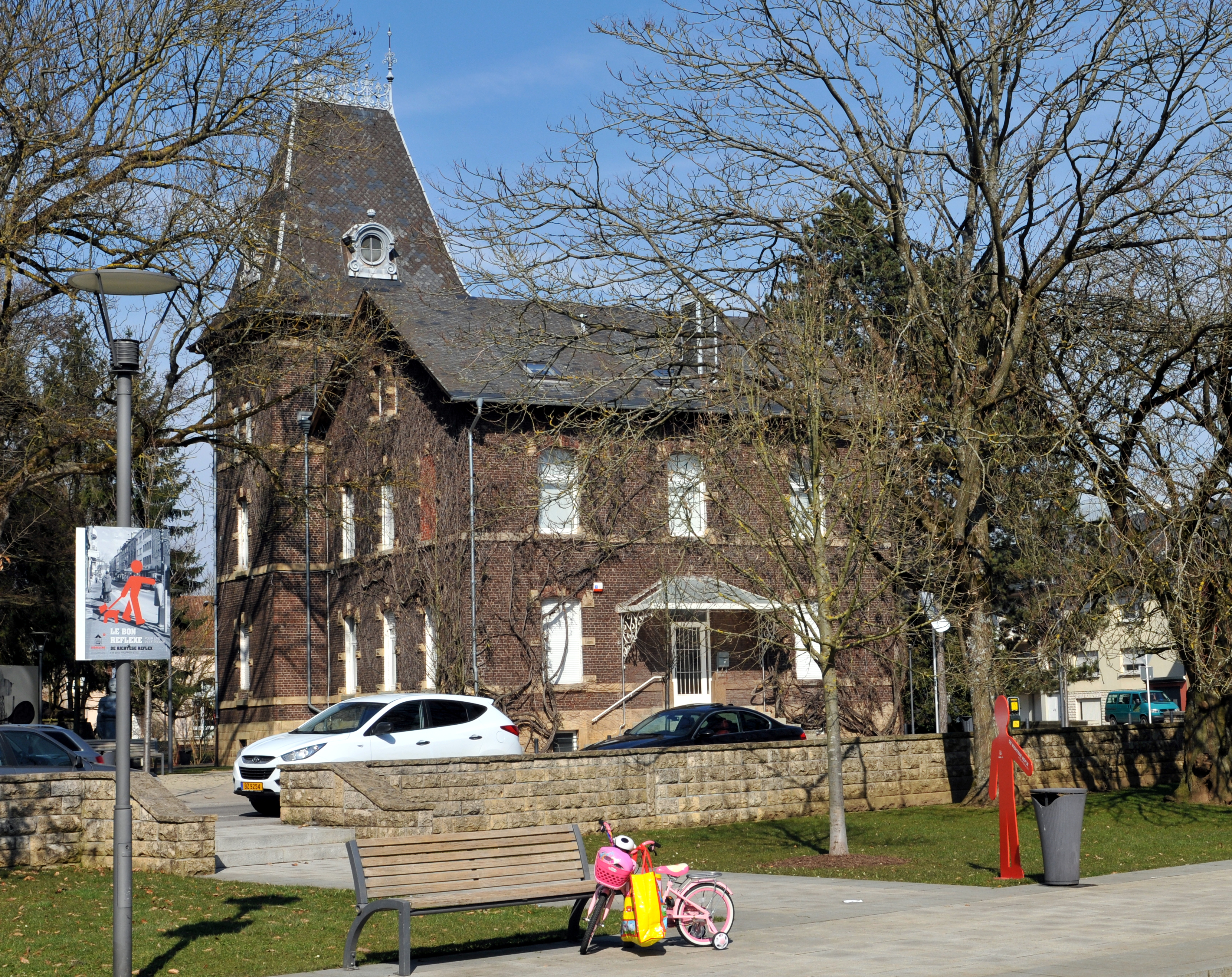 Diddeleng, d'fréier Direkteschvilla am Brill, lo Galerie Dominique-Lang.